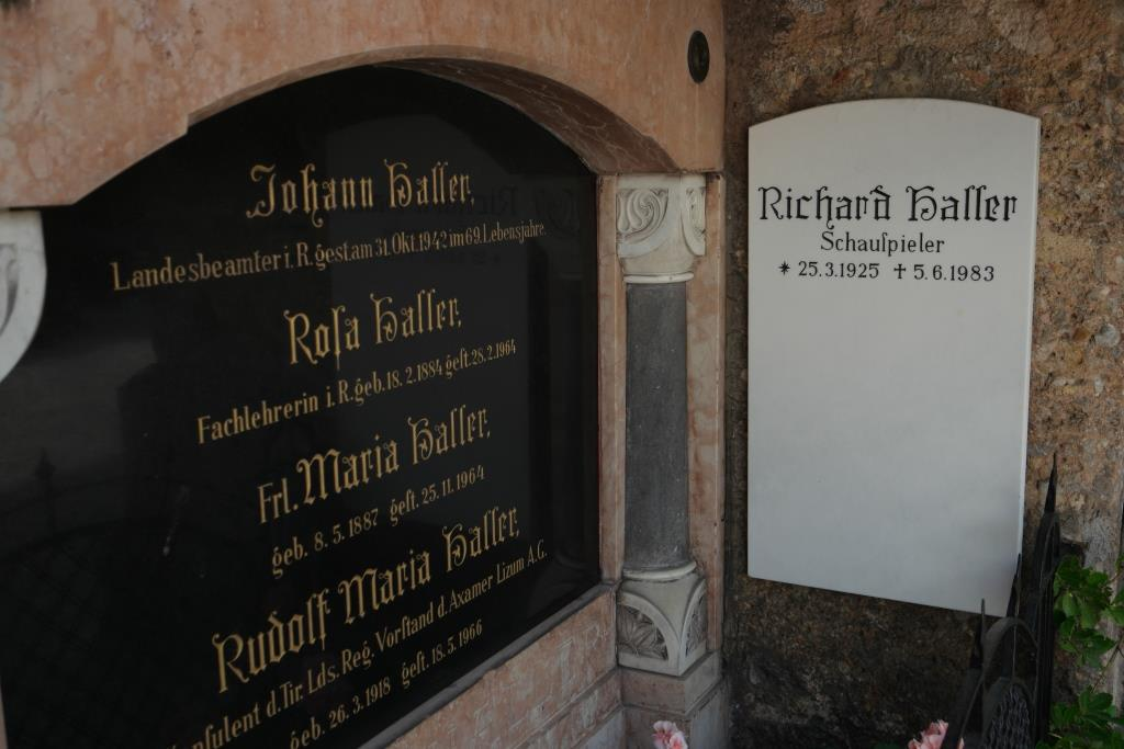 Grab des Schauspielers und Synchronsprechers Richard Haller (1925-1983) auf dem St. Nikolaus-Friedhof Innsbruck